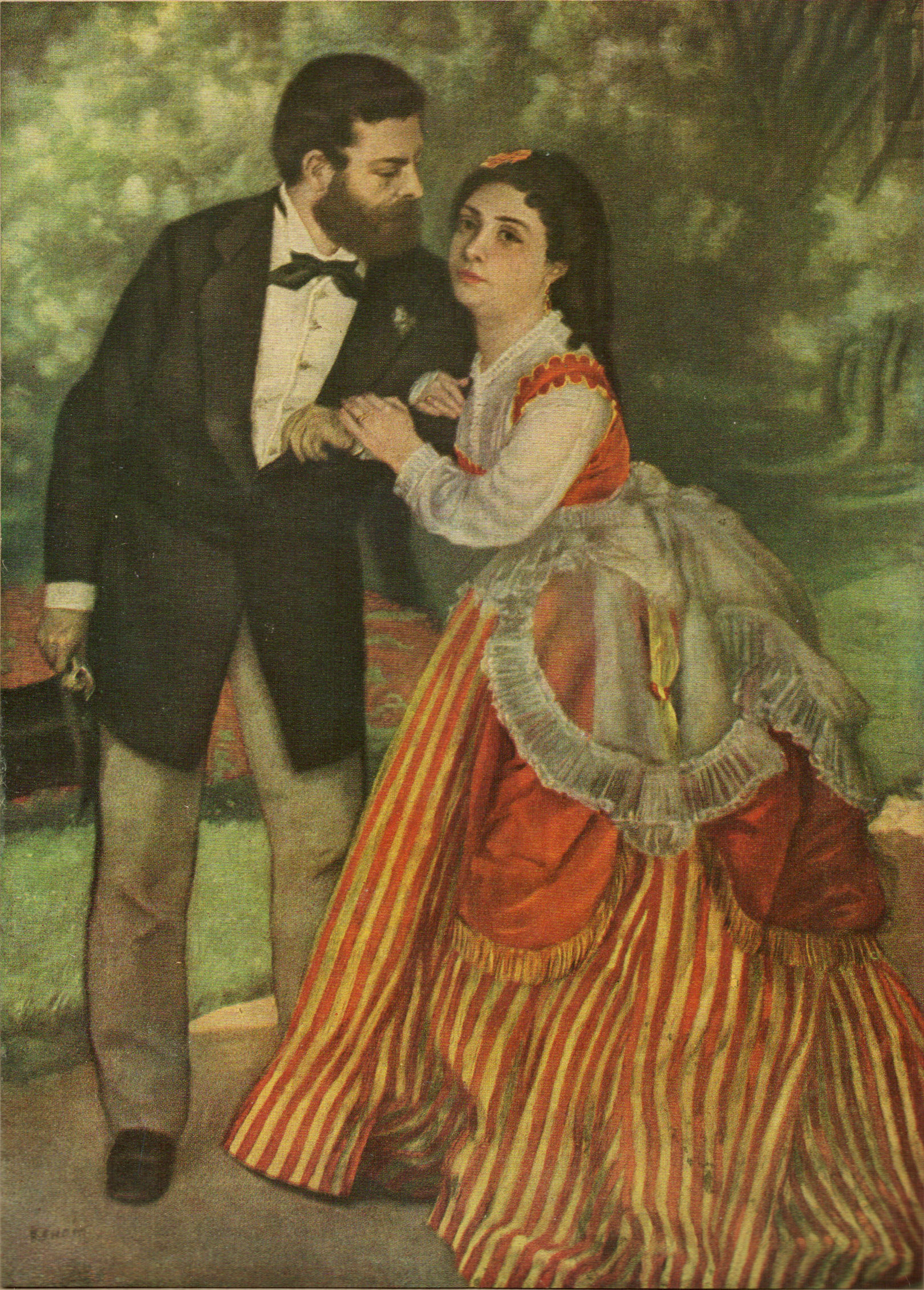 Alfred Sisley & son épouse, peints par Auguste Renoir vers 1868